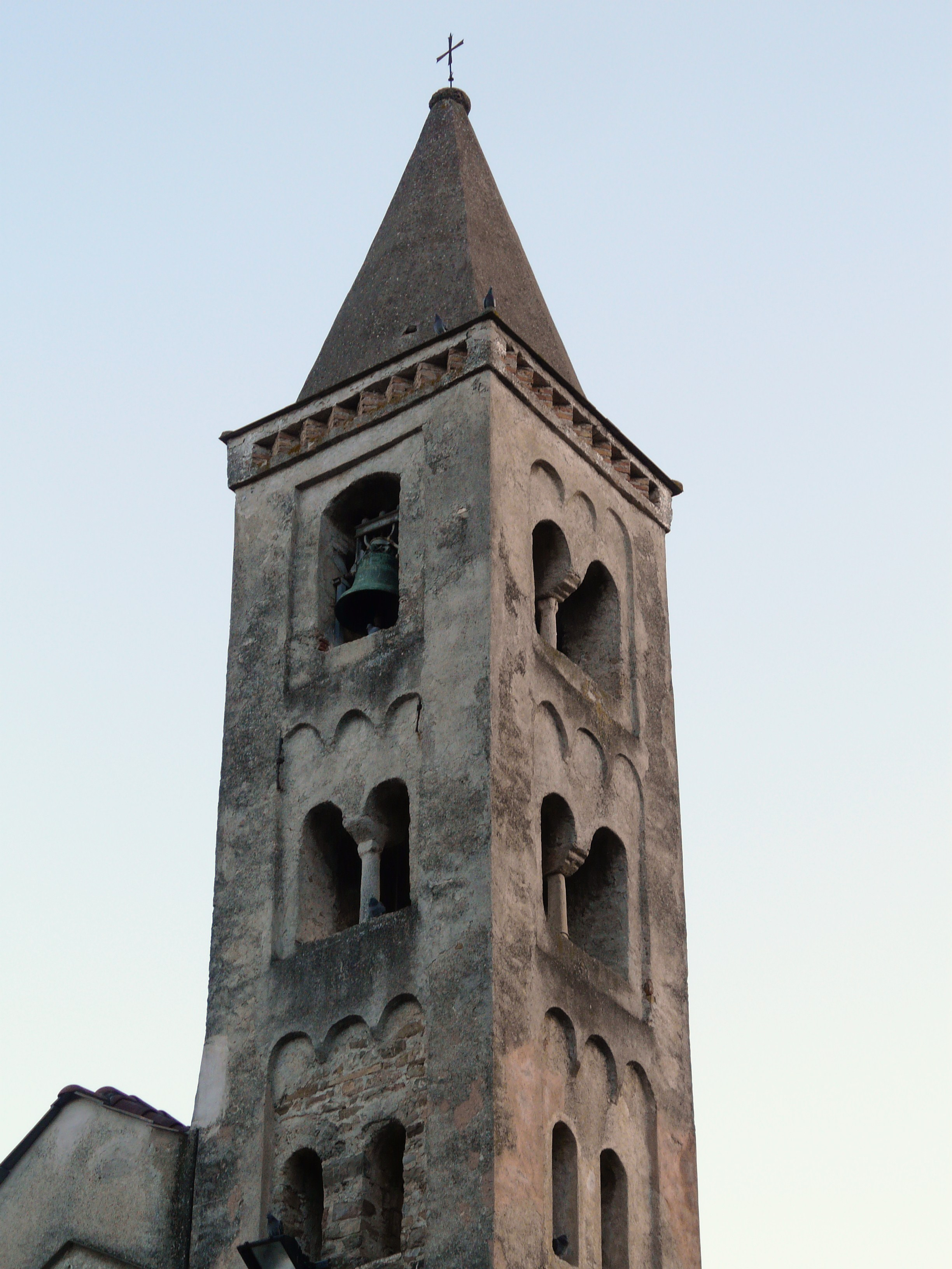 Chiesa di Santo Stefano di Cavatorio, Villanova d'Albenga, Liguria, Italia